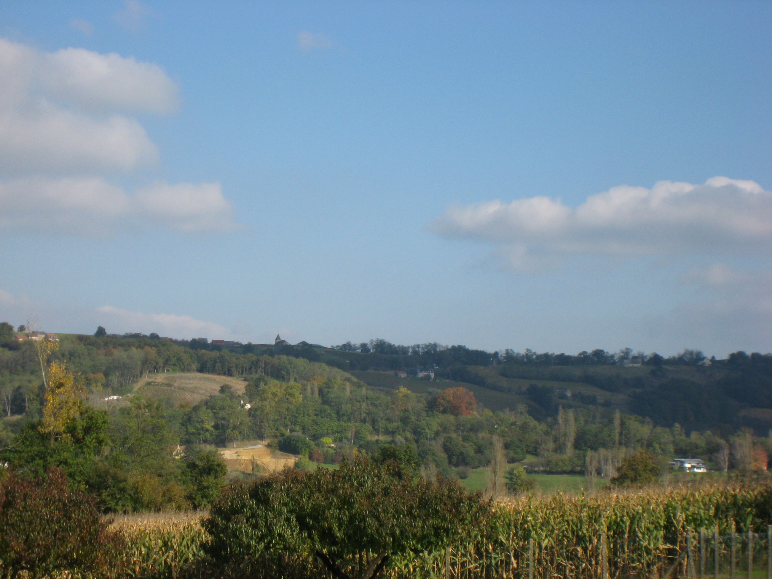 Vue des crêtes de Cuqueron depuis Monein (Pyrénées Atlantiques) Pyrénées).